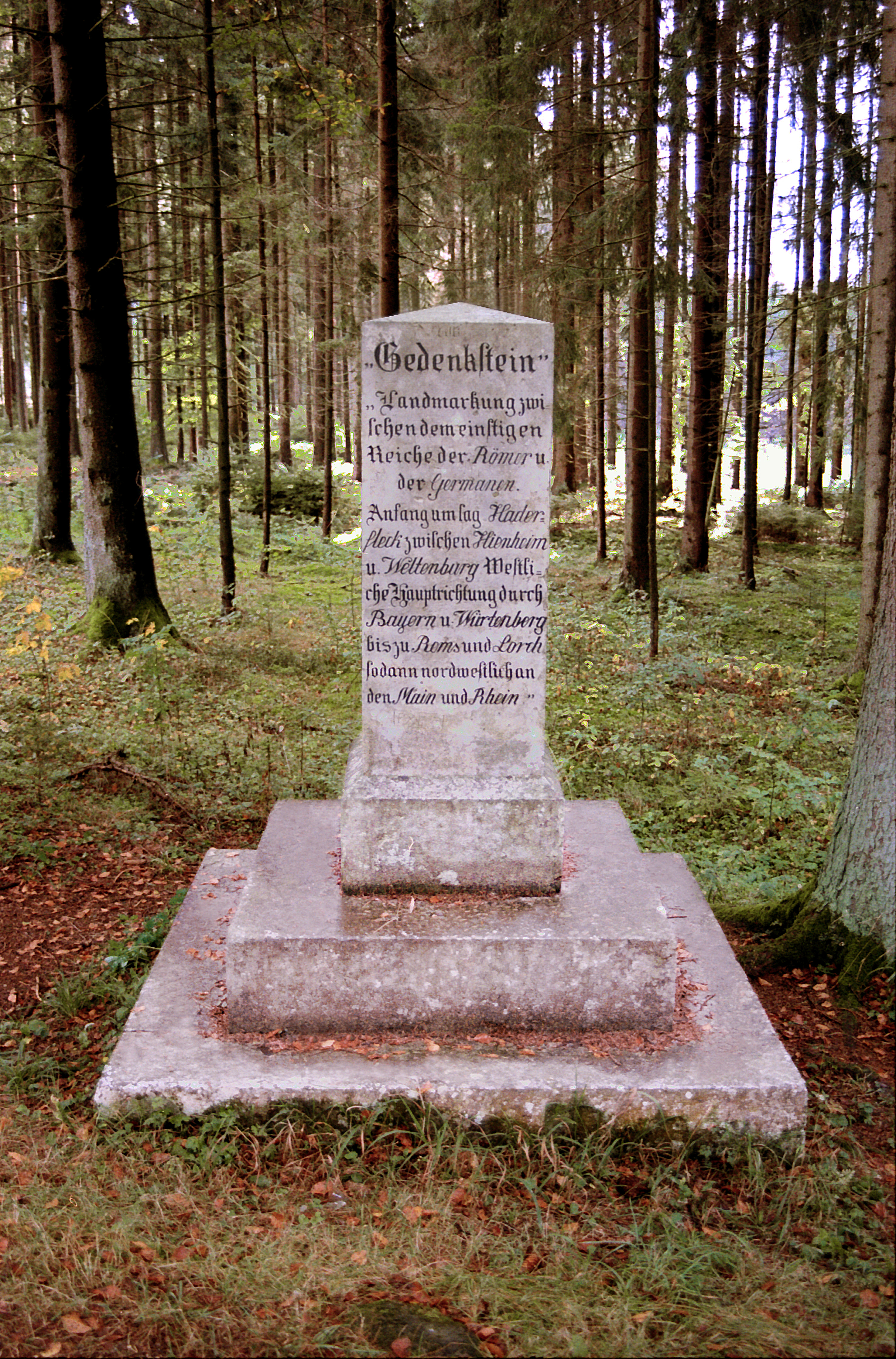 Limes-Gedenkstein zwischen Wp 14/63 und Wp 14/64 bei Erkertshofen in Bayern. Der in der 2. Hälfte des 19. Jahrhunderts errichtete Stein wurde von der Nürnberger Naturhistorischen Gesellschaft restauriert.